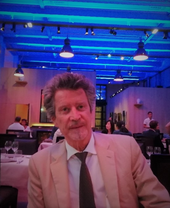 Jean-Philippe Domecq, écrivain. Photo prise en 2019